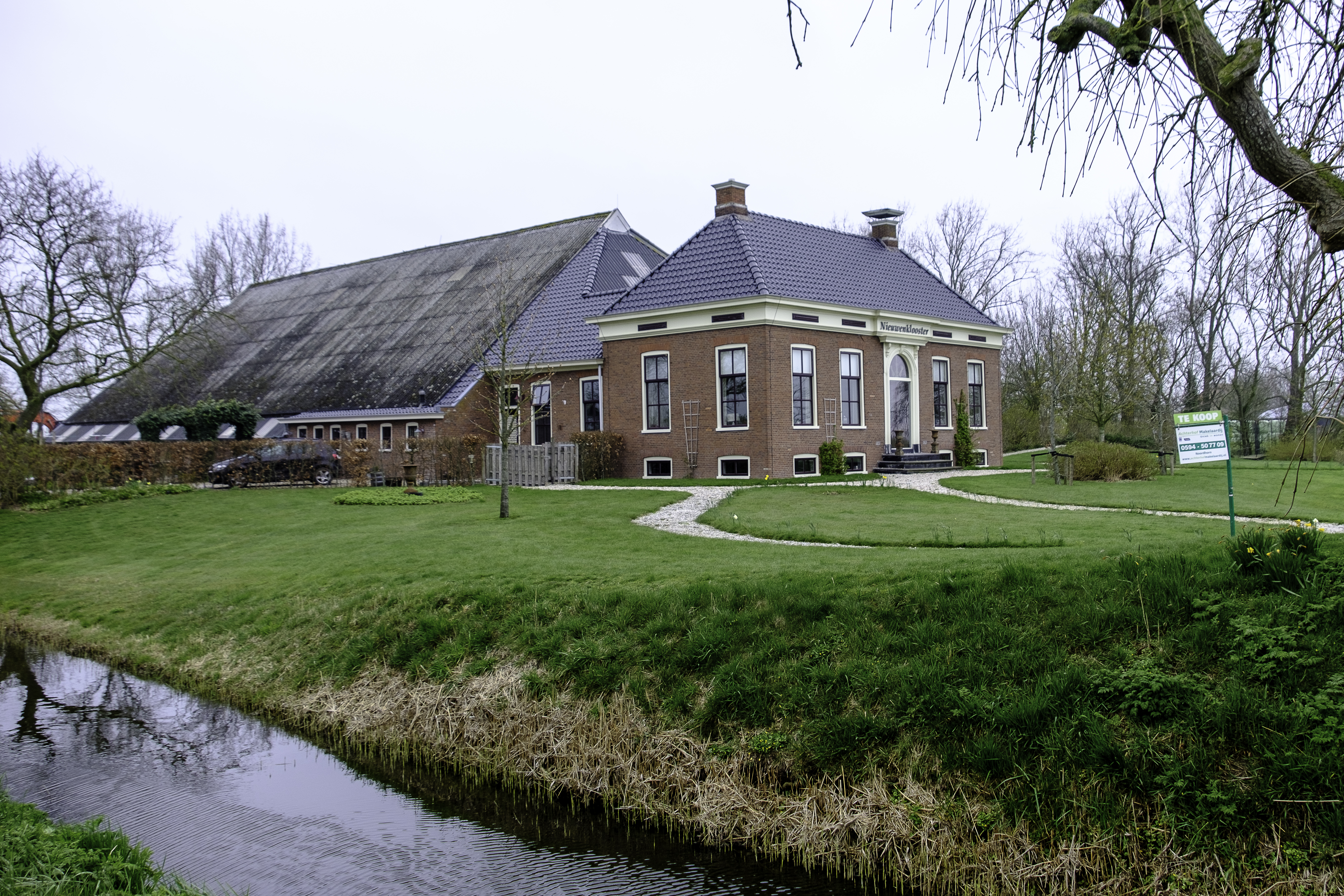 Boerderij Nieuwenklooster nabij de wierde Nijenklooster (Delfzijl, Groningen, Nederland).